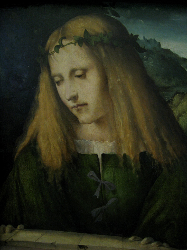 Nach Ovid in den Metamorphosen berichtet, verliebte sich Narziß so sehr in sein unerreichbares Abbild, dass er vor Gram darüber starb. Durch Beschneidung wurde das Bild entfremdet. Im 19. Jahrhundert wurde der androgynen Jüngling durch wenige Übermalungen in eine heilige Katharina mit dem Rad verwandelte. Diese Übermalungen sind heute entfernt